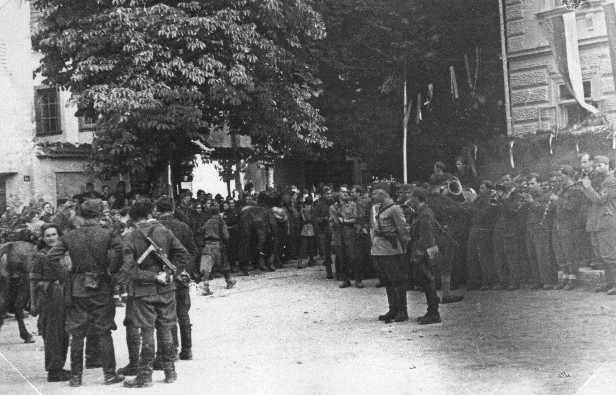 Prihod 8. divizije iz Korduna v Črnomelj.